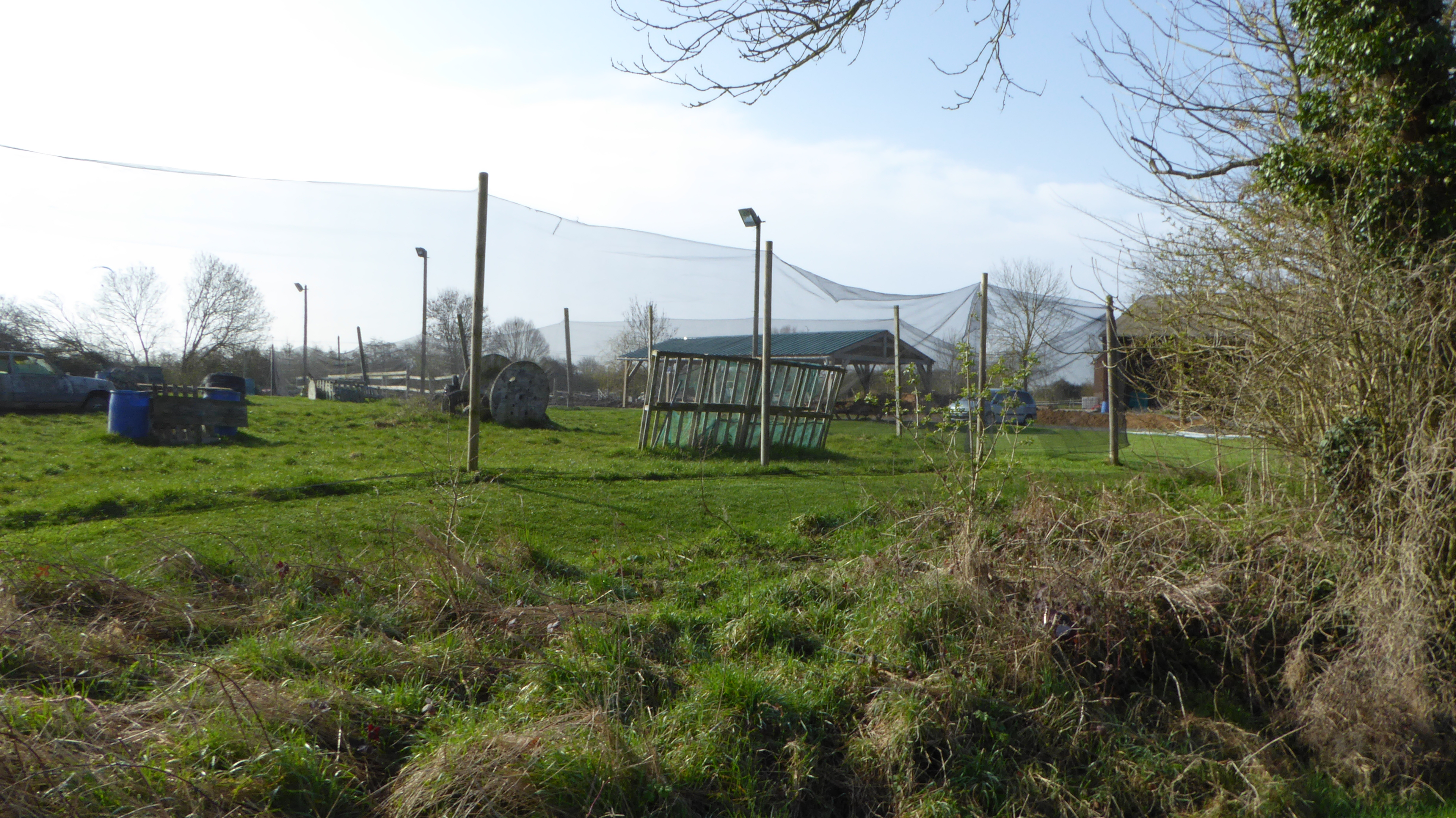 Nord Aventure Paintball Aubers Nord Nord-Pas-de-Calais-Picardie France.